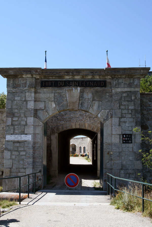 Fort du Saint-Eynard, sur les hauteurs de Grenoble (France)